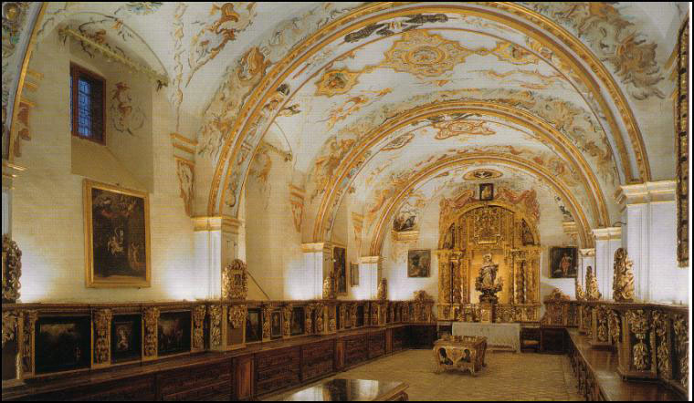 Sacristía. Monasterio de Yuso. San Millán